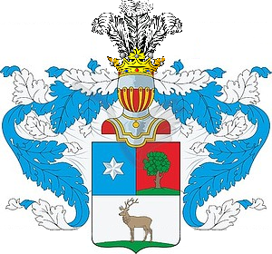 Герб рода Буличей